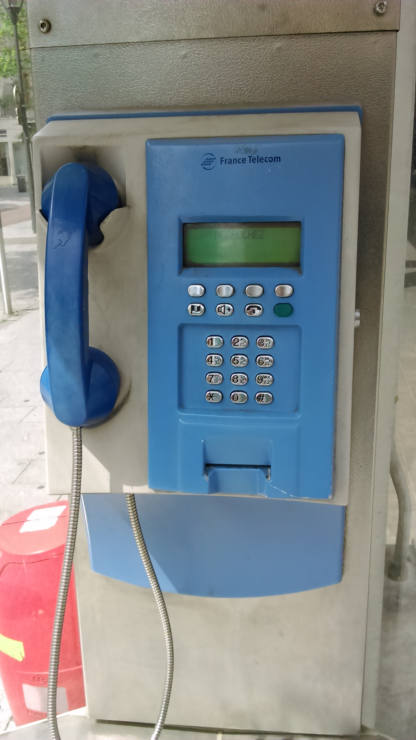 Téléphone public France Télécom dans une cabine à Mulhouse.